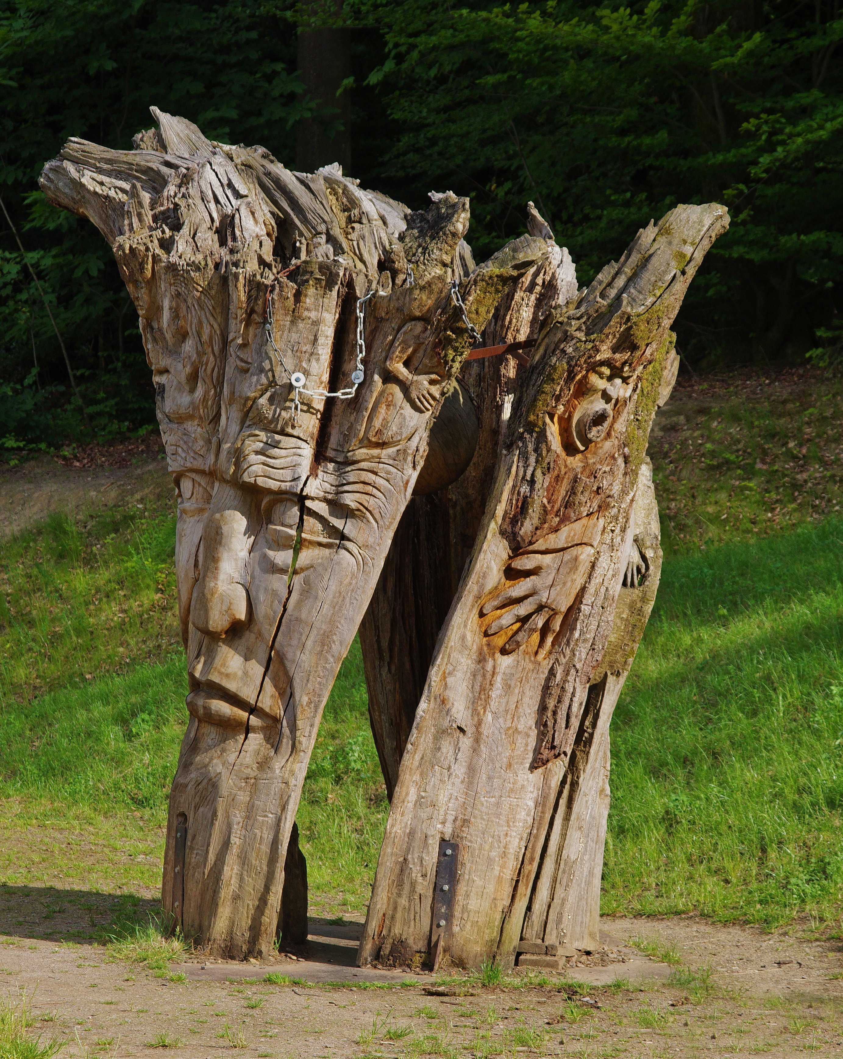 Baumwelt Aus dem Holz einer 230 jährigen Eiche WaldMenschen von Thomas Rees ein ständige Ausstellung auf dem Skulpturenpfad des Waldhaus Freiburg